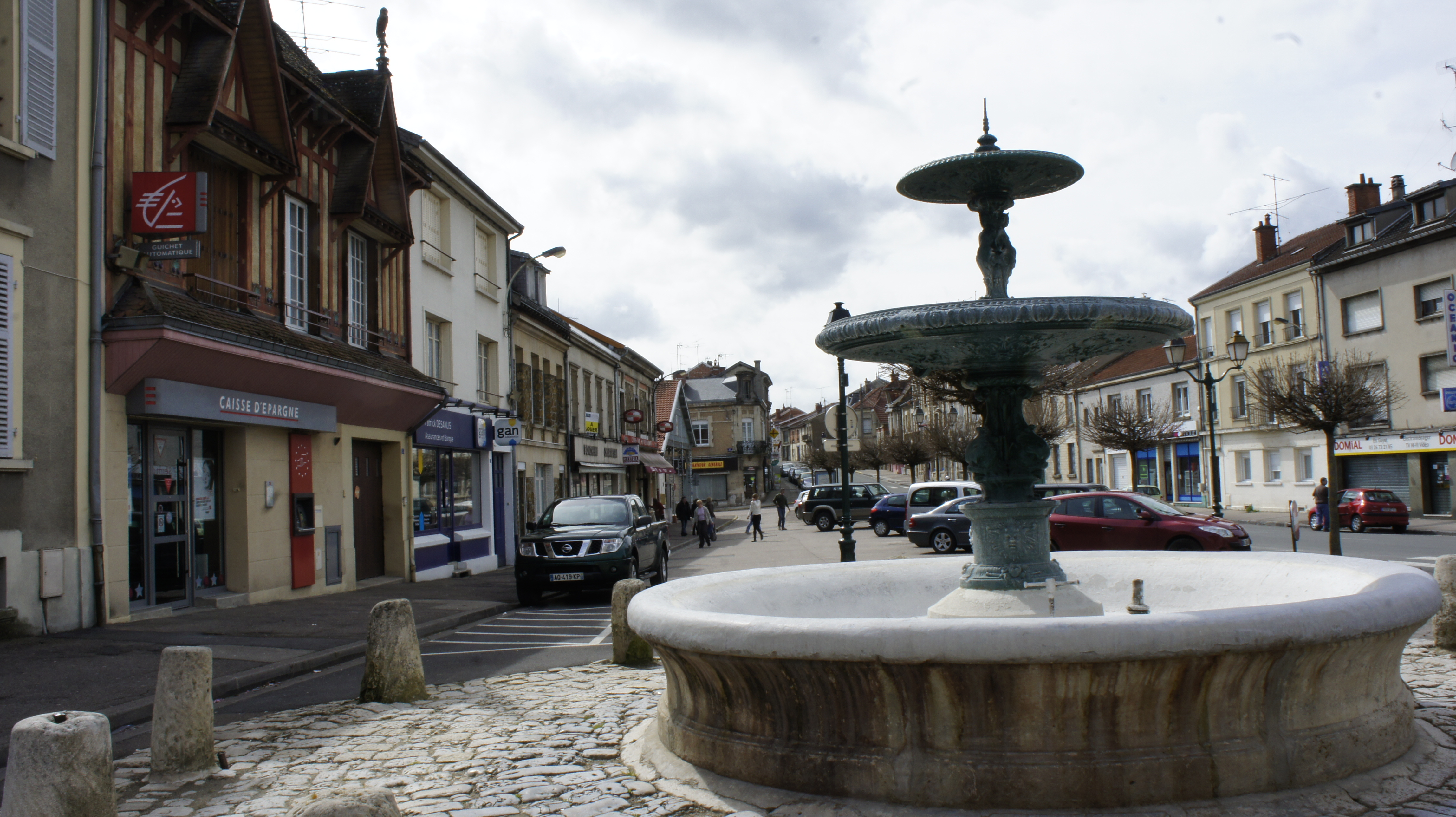 La fontaine sur la palce de la mairie .